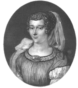 Marie de Gournay. Lithographie du 19ème siècle réalisée à partir d'un dessin de N. H. JACOB conservé à la bibliothèque de Bordeaux. (cote LXXXI/29 Microfilm 100/10)